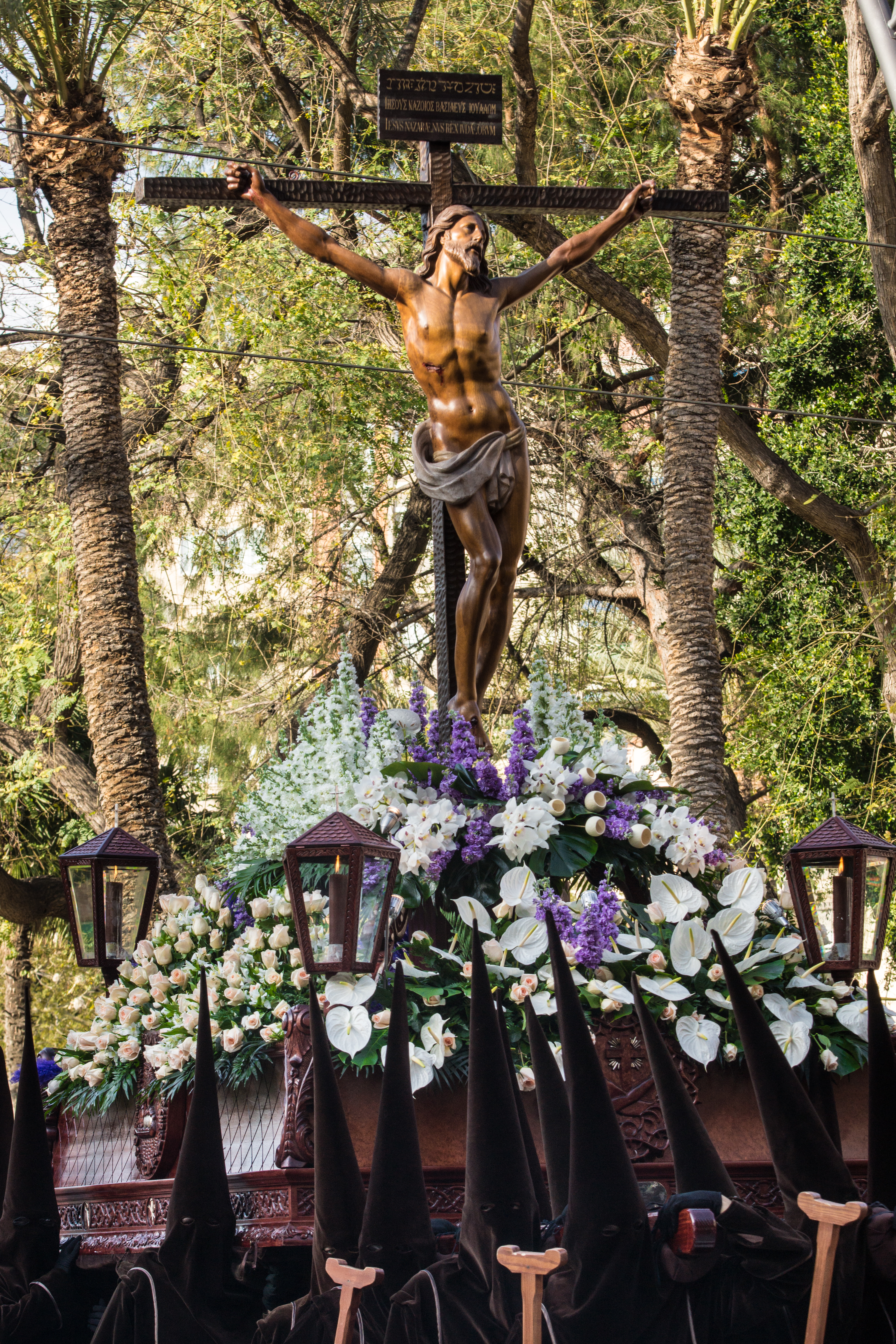 Cisto de la Fe por Alfonso X el Sábio This is a photography of a Folklore festival in Spain (Wikidata id Q5685566).